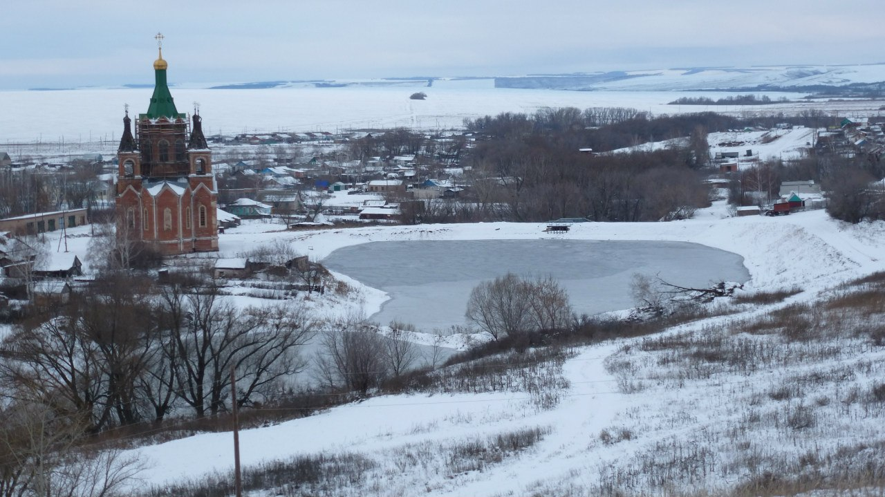 Церков и Озеро